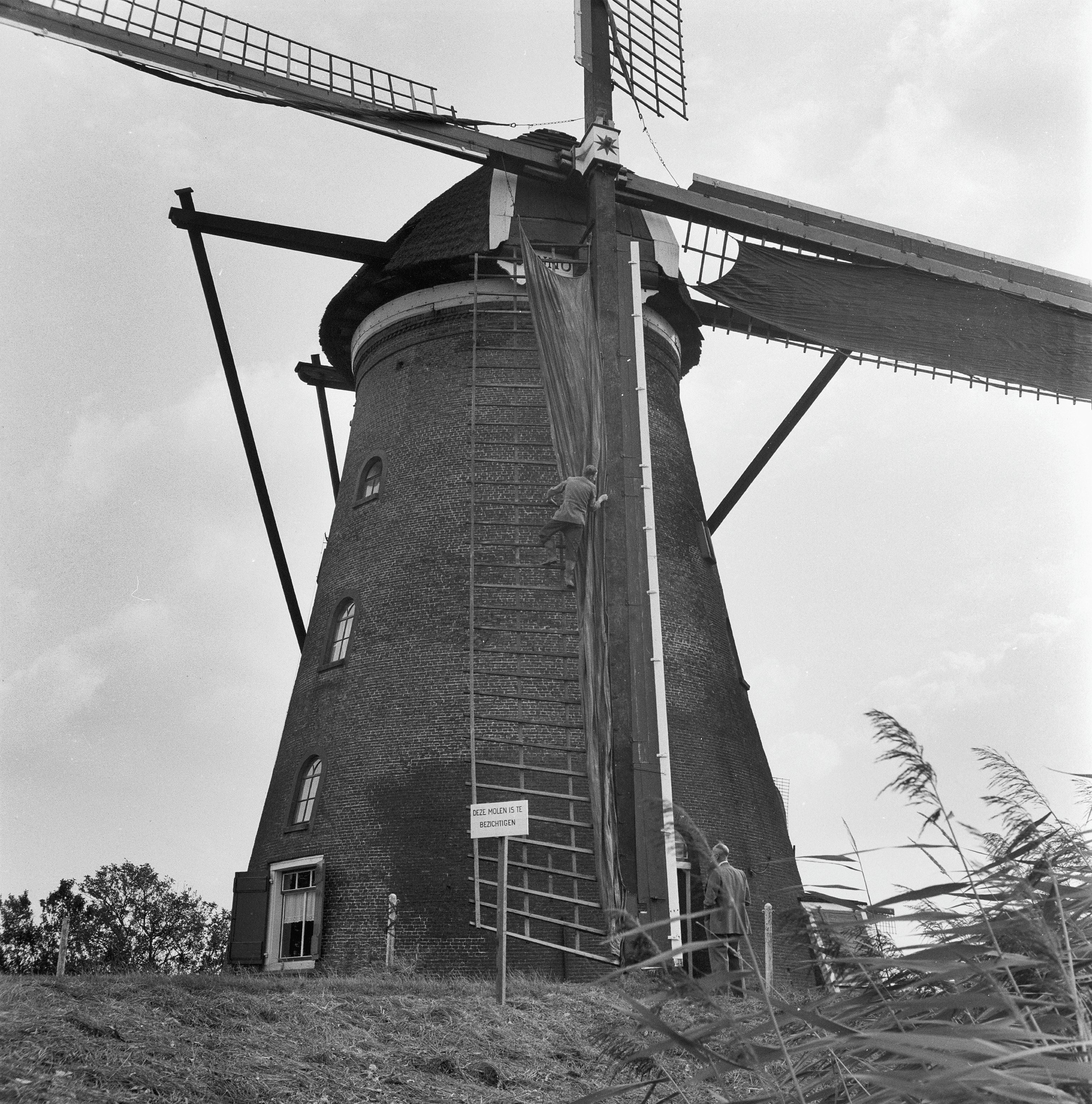 Molens: tweede molen van de Nederwaard, de zeilen worden er voor gelegd